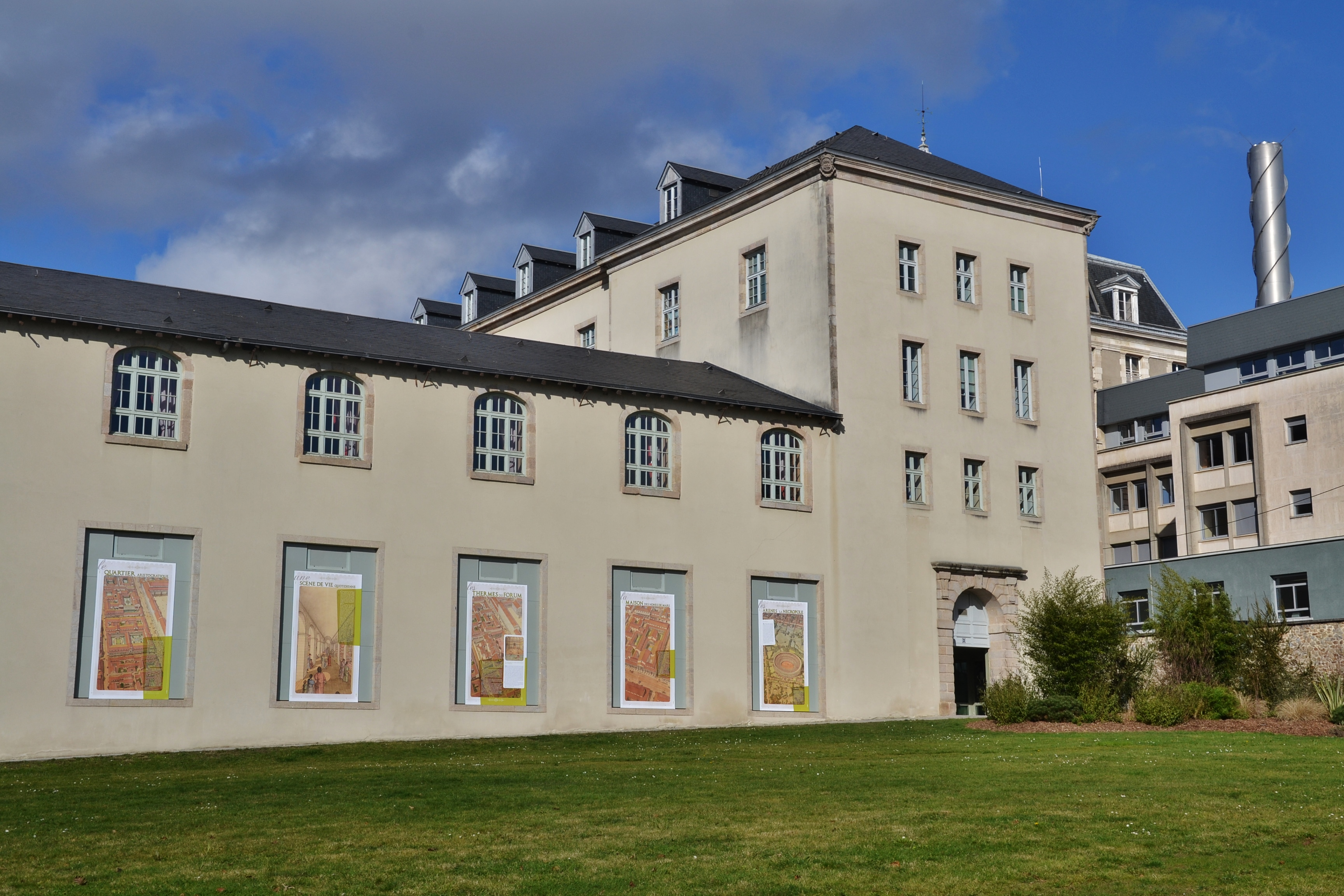 La galerie des hospices de Limoges (Haute-Vienne, France)